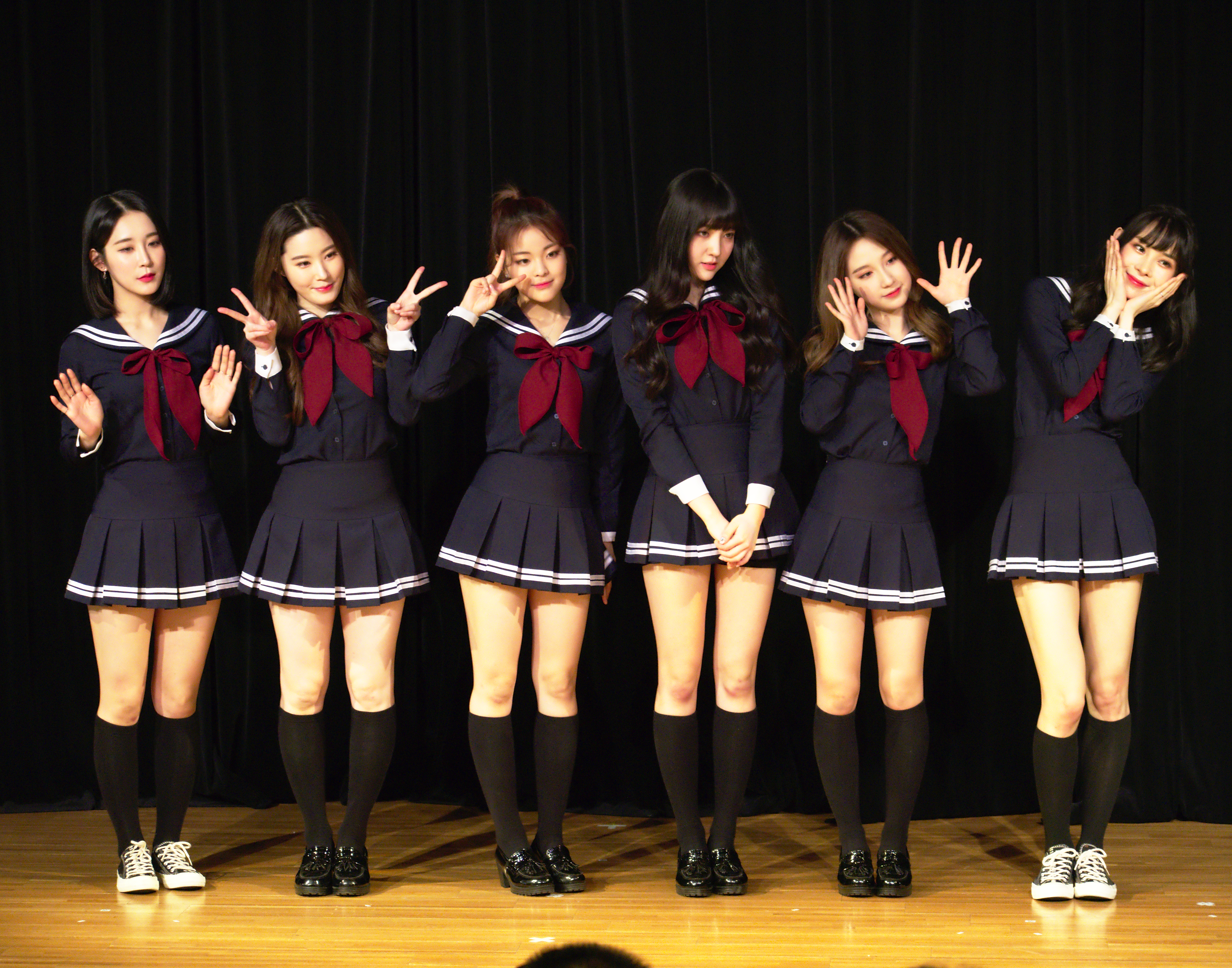 S.I.S Spring Live in Tokyo 第二部